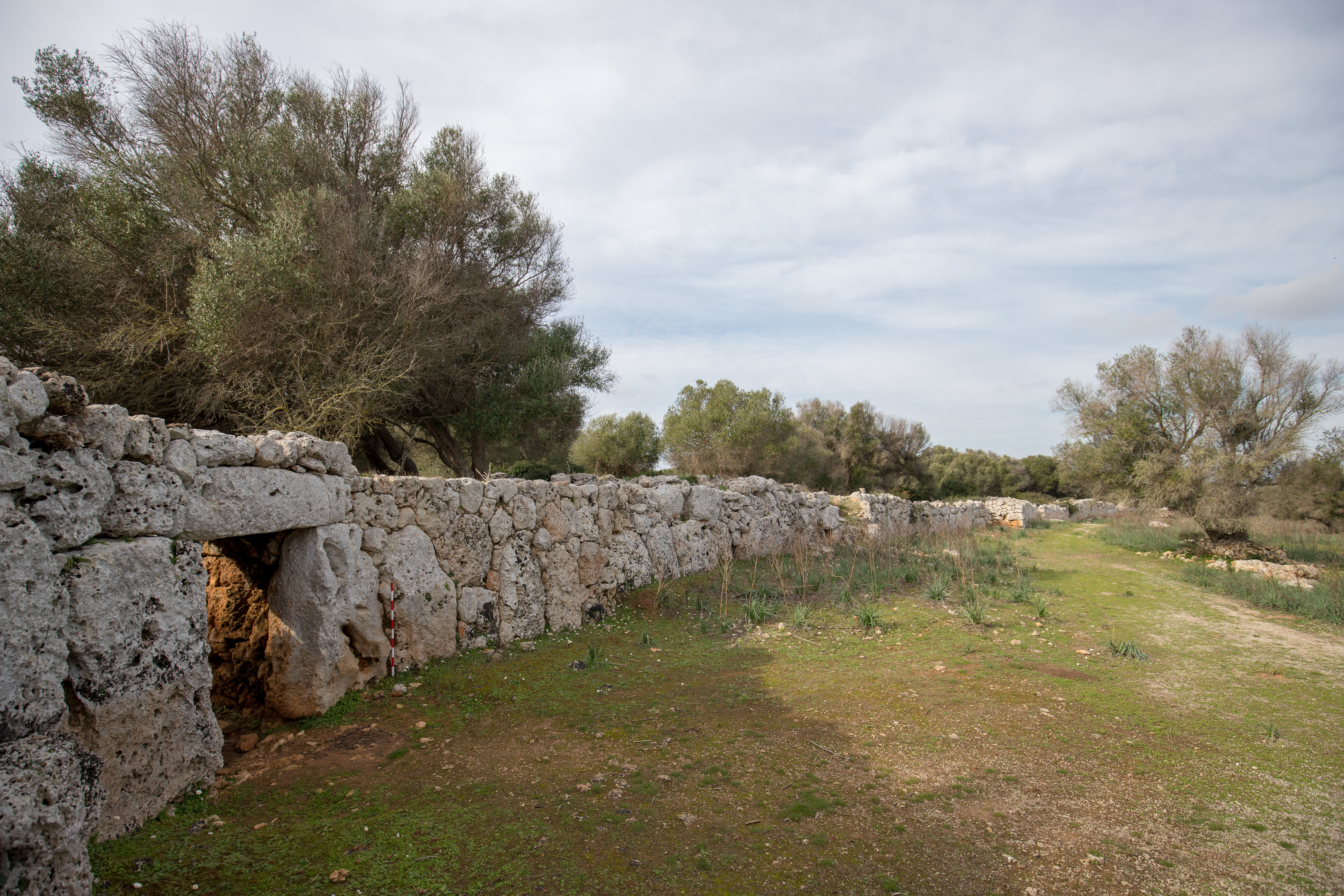 Fragment de murada del poblat talaiòtic de Son Catlar amb porta d'accés al recinte